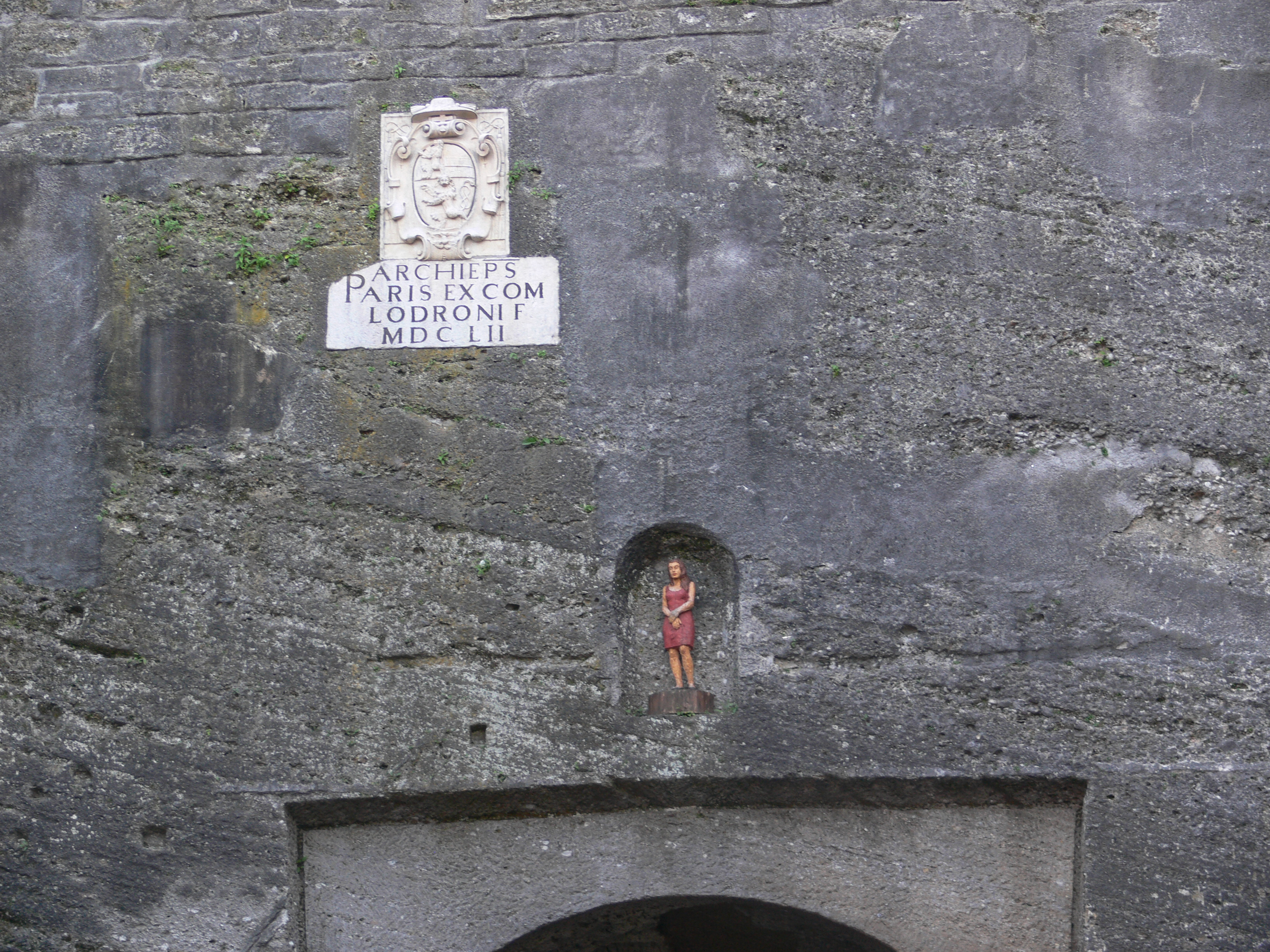 Skulptur "Frau im Fels" von Stephan Balkenhol im Toscaninihof (südlicher Abschluss des Salzburger Festspielhauskomplexes); aufgestellt im Rahmen des "Kunstprojekts Salzburg 2007" der Salzburger Festspiele